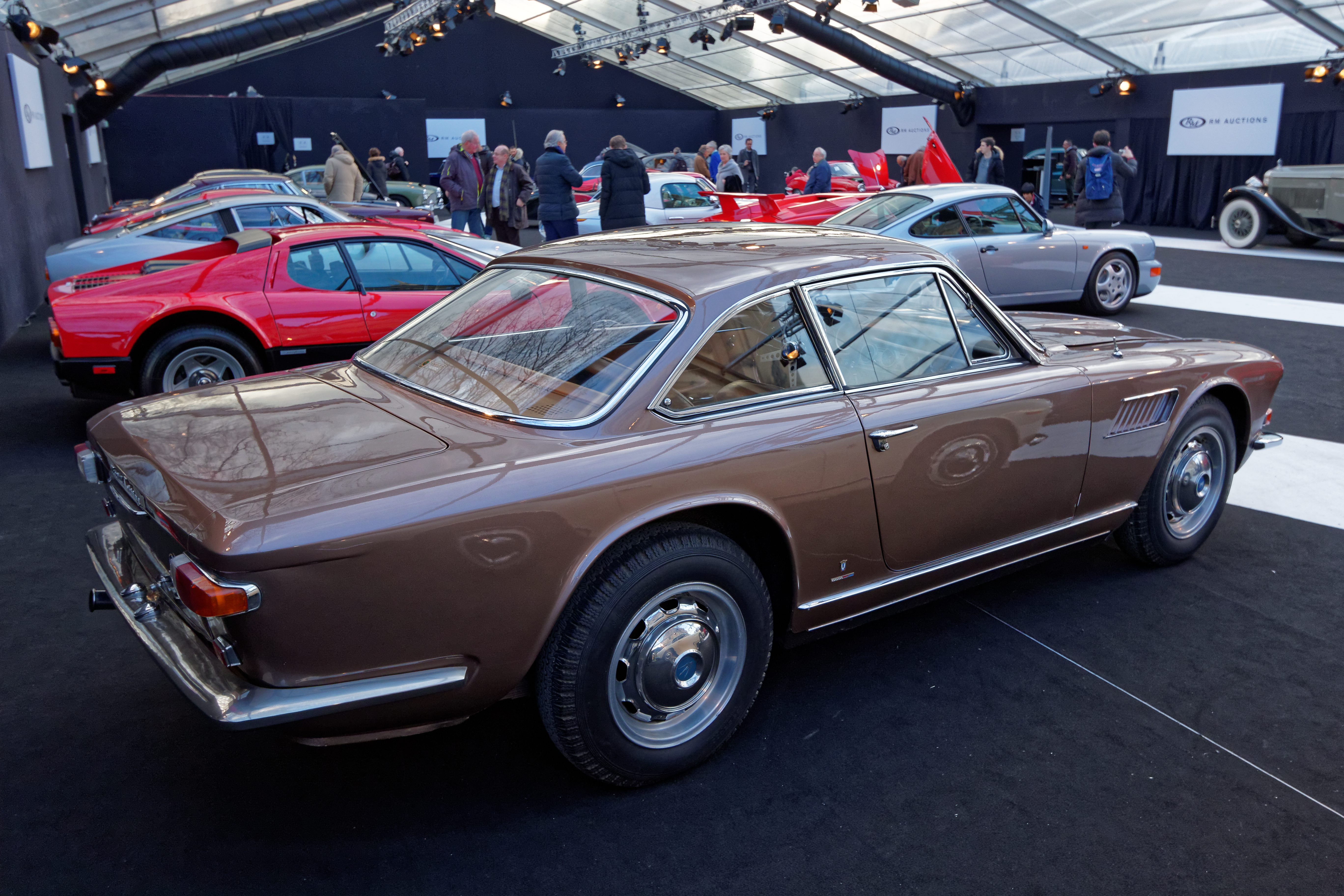 La vente aux enchères RM auctions aux pied des Invalides à Paris le 4 février 2015.